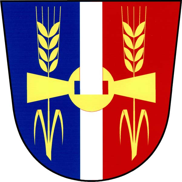 Znak obce Lány (okres Chrudim)